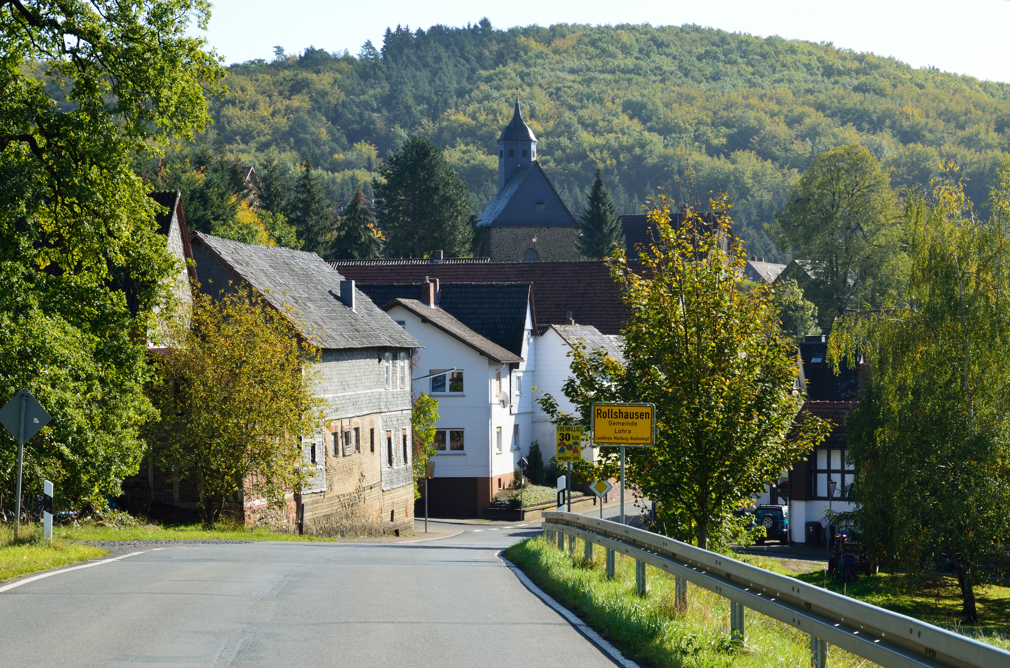 Rollshausen (Lohra), K50, nordwestlicher Ortseingang